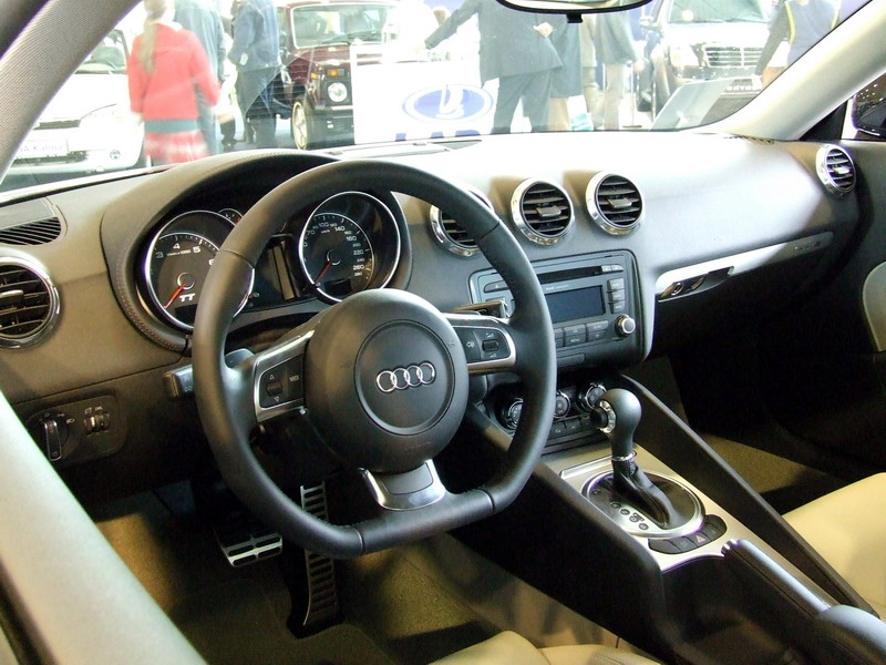 Audi TT Coupe